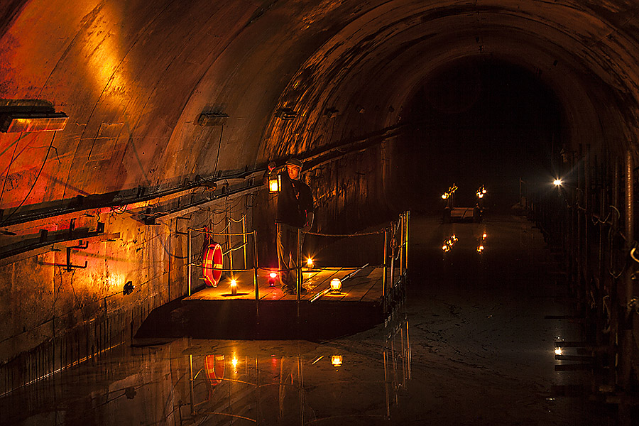 Tunnel allagato della linea tranviaria rapida. Galleria borbonica, Naples.